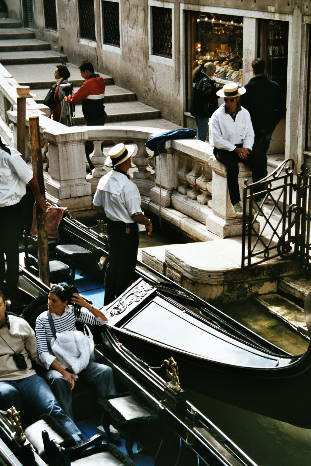 Gondoles et gondoliers à Venise